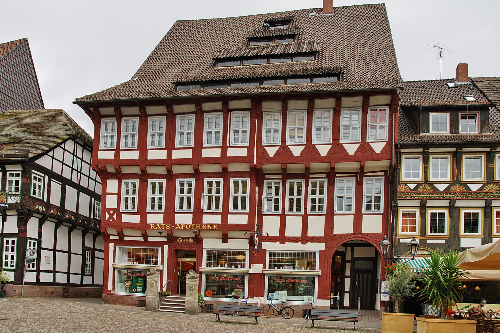 Ratsapotheke in Einbeck, Niedersachsen, Deutschland